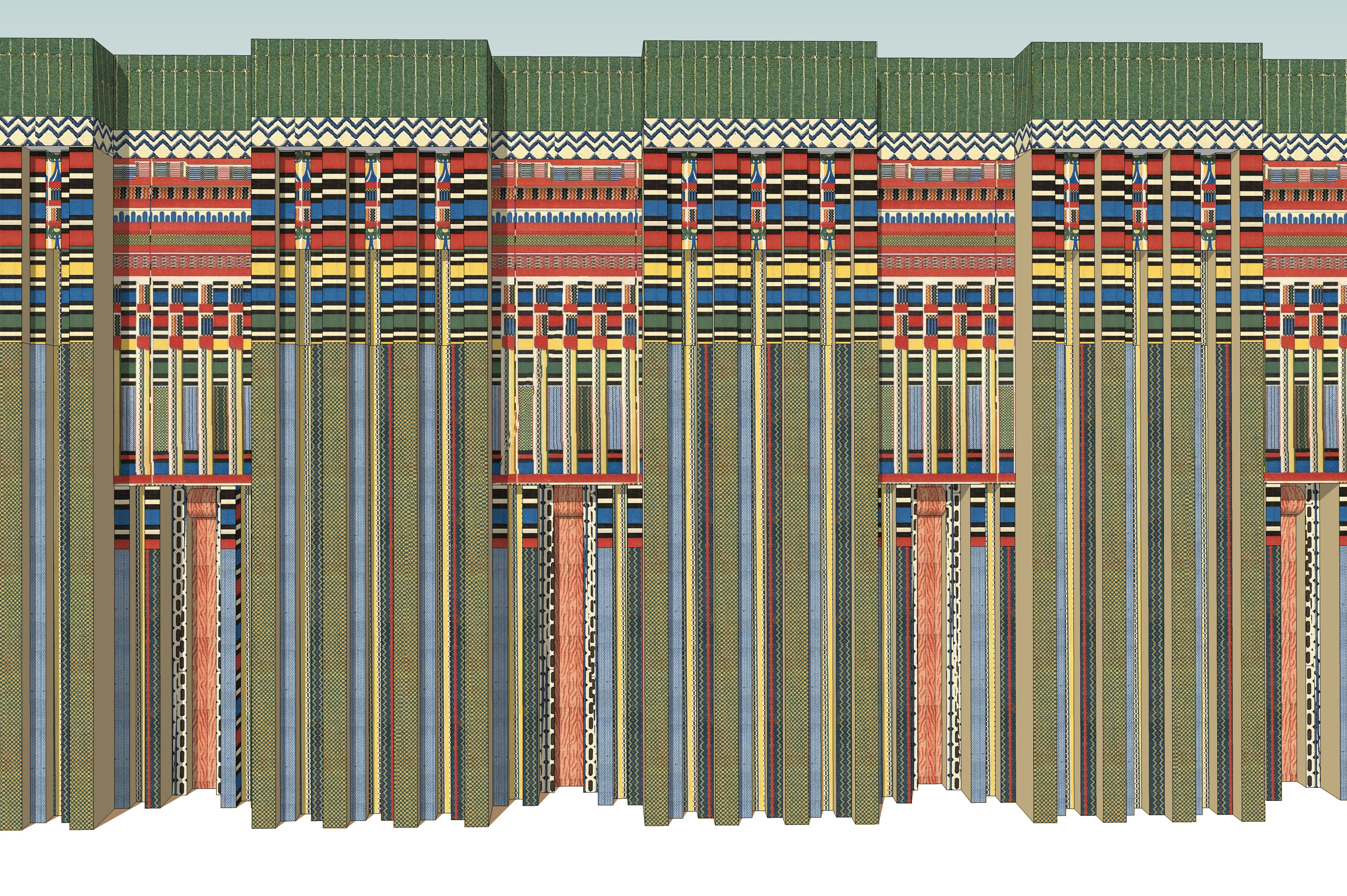 Décoration type de "façade de palais" reproduite sur les mastabas égyptiens (D'après les motifs du mastaba de Ptahotep (Figuier et Chipiez, "Histoire de l'art, volume I"))